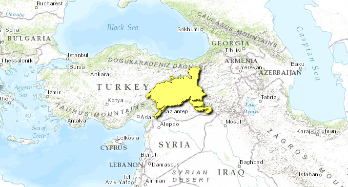 Mappa Ecoregione PA0420 - Foreste decidue dell'Anatolia orientale